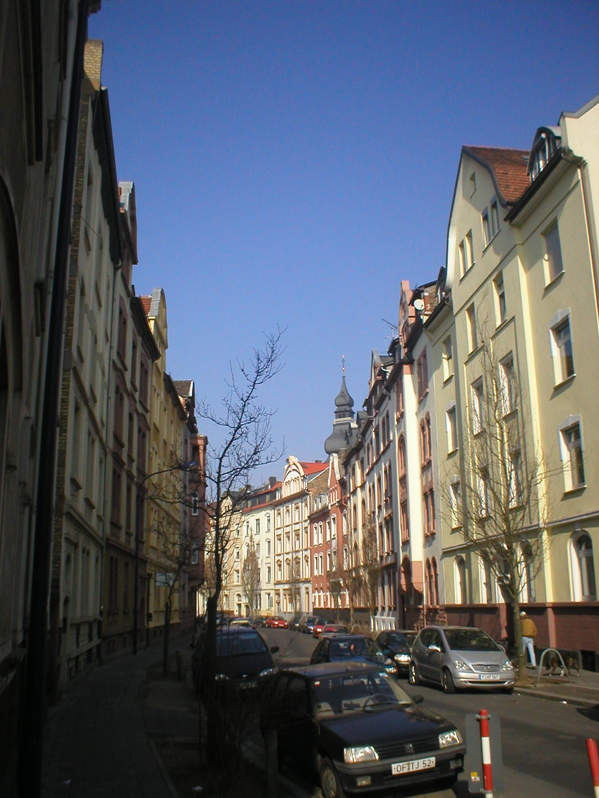 The Krafftstr. in the Mathildenviertel, Offenbach/Germany